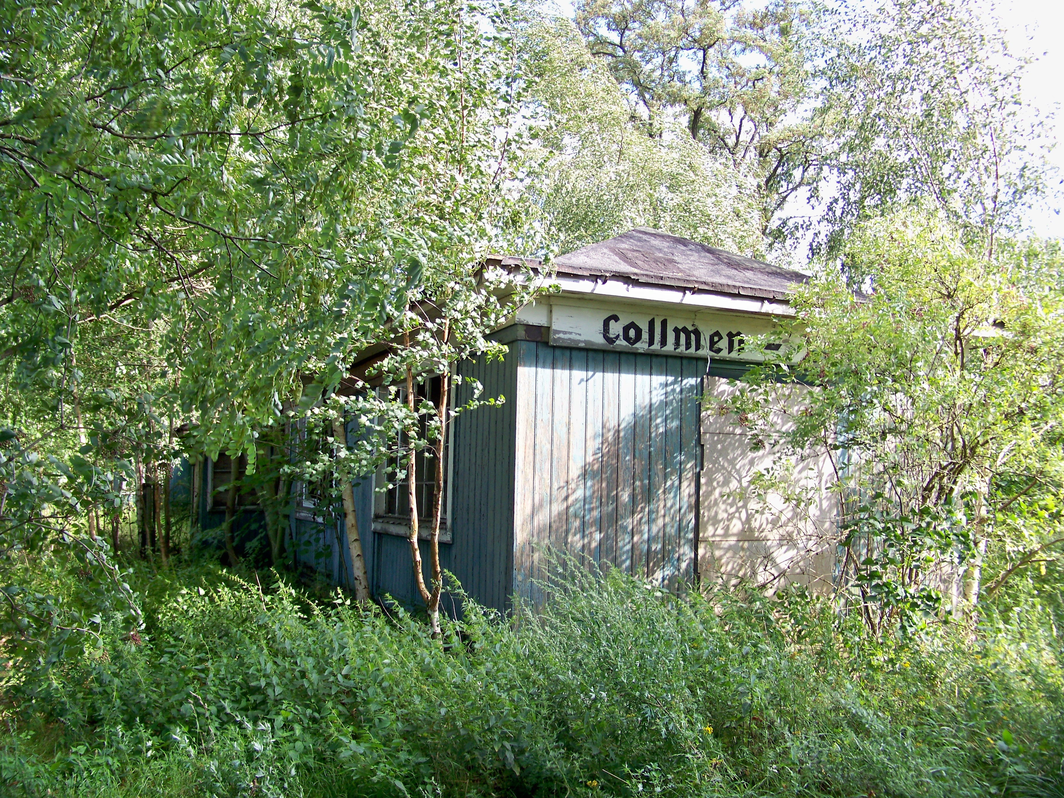 Altes Bahnhofsgebäude des Bahnhofes Collmen-Böhlitz an der Strecke Eilenburg–Wurzen